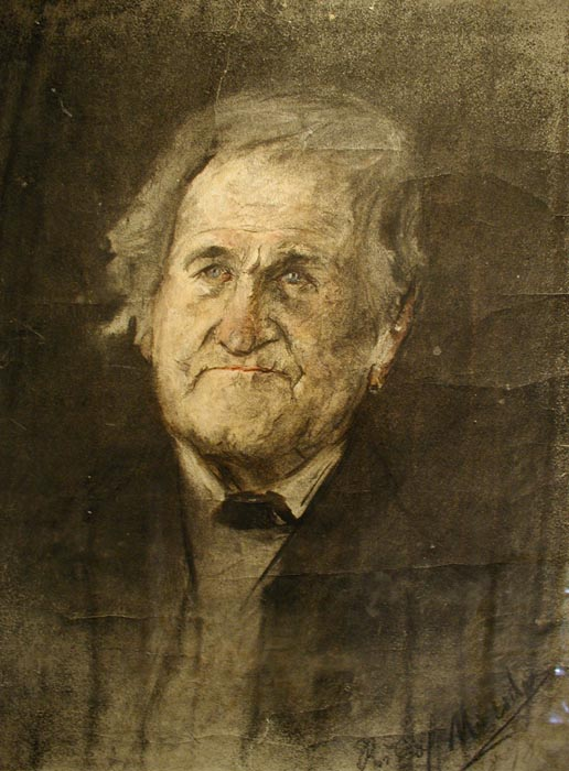 Portrait by Rudolf Moroder